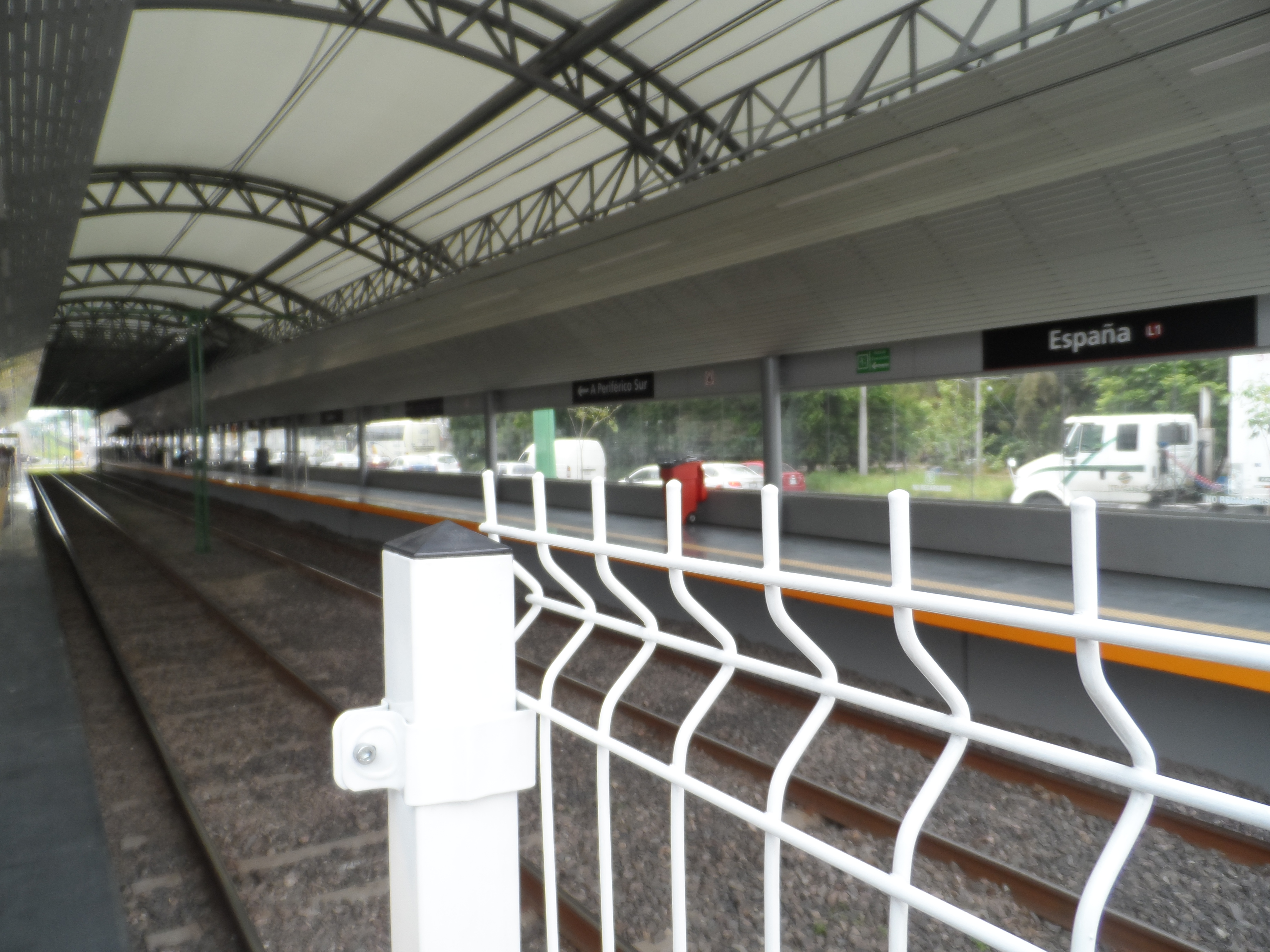 Andenes de la estación "España" de la Línea 1 del Tren Ligero de Guadalajara.